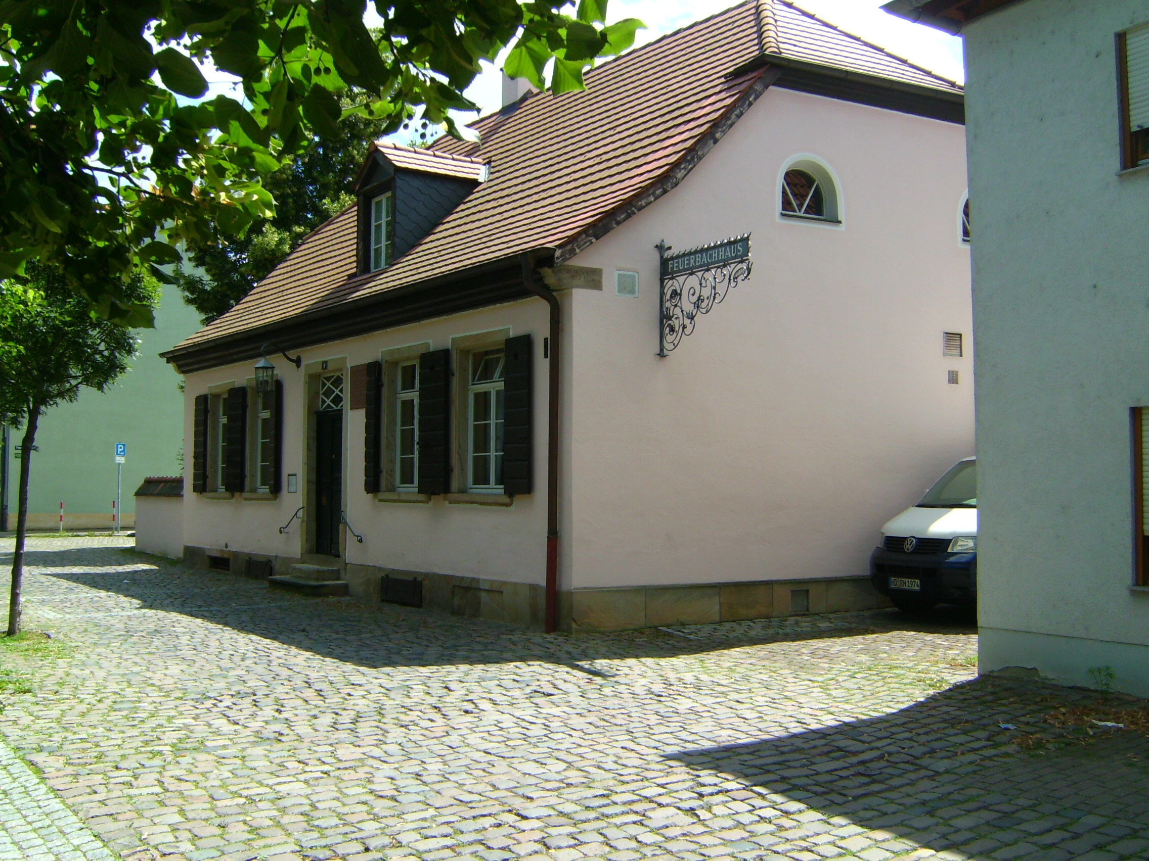 Museum, Feuerbachhaus in Speyer